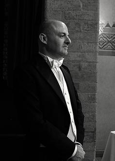 Il M° Renato Negri durante un concerto